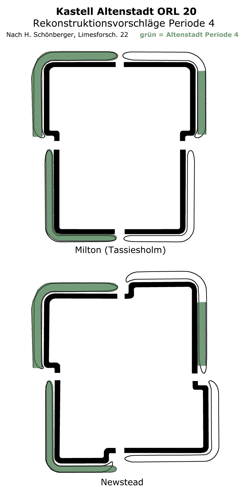 Kastell Altenstadt, Vergleich der Periode 4 mit Kastellen in Britannien (nach H. Schönberger 1983).